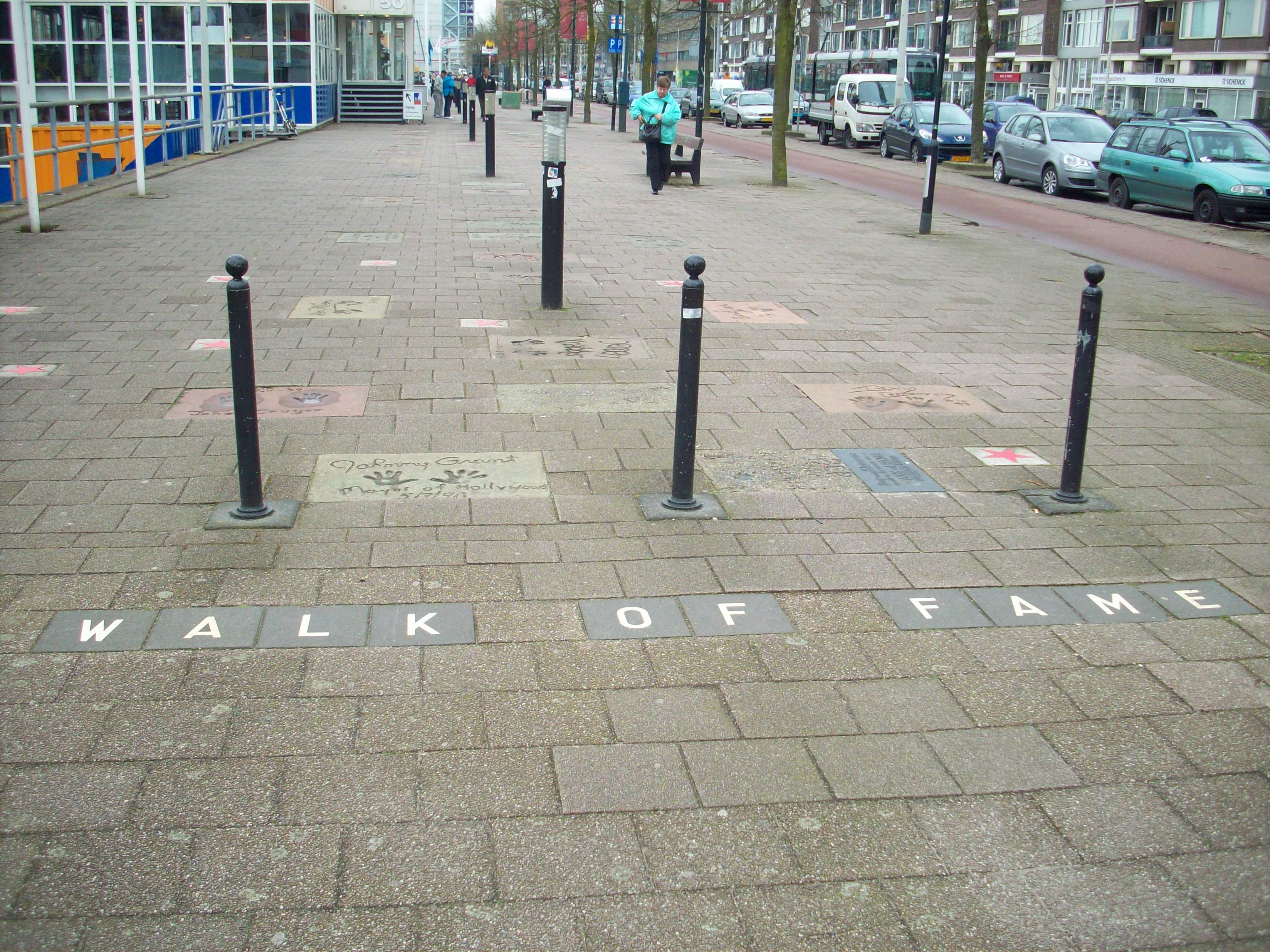 Foto van de Europese versie van de Walk of Fame